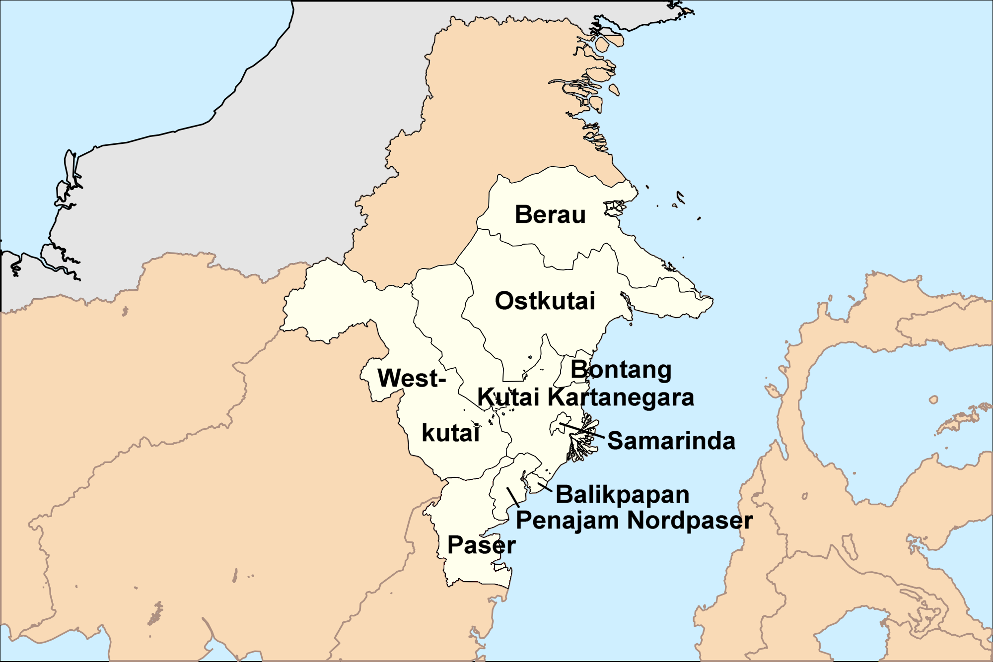 Distrikte von Ostkalimantan